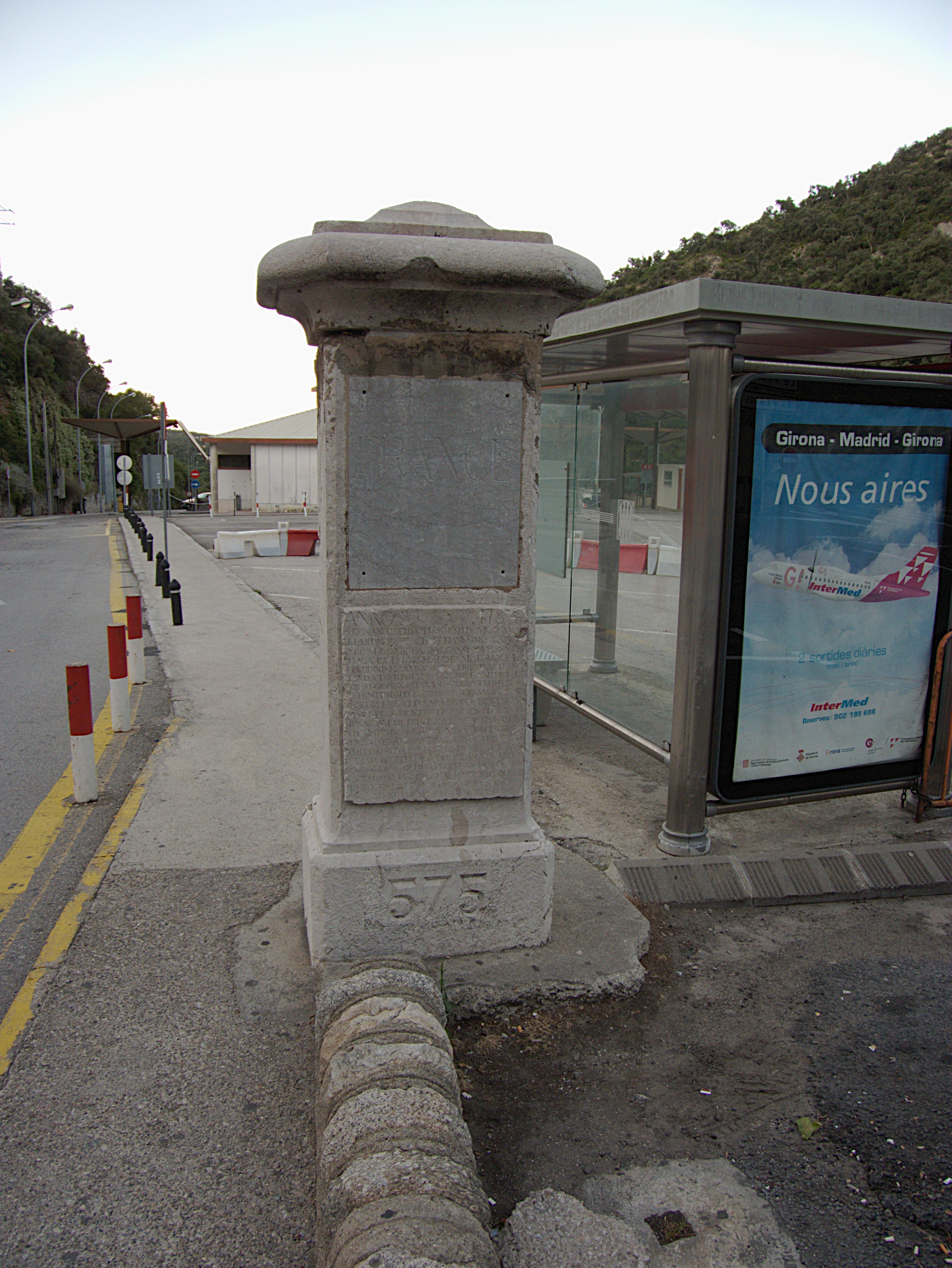 Pilier frontière n° 575, Le Perthus (Pyrénées-Orientales, Languedoc-Roussillon, France), La Jonquera (Haut-Ampurdan, Gérone, Catalogne, Espagne)